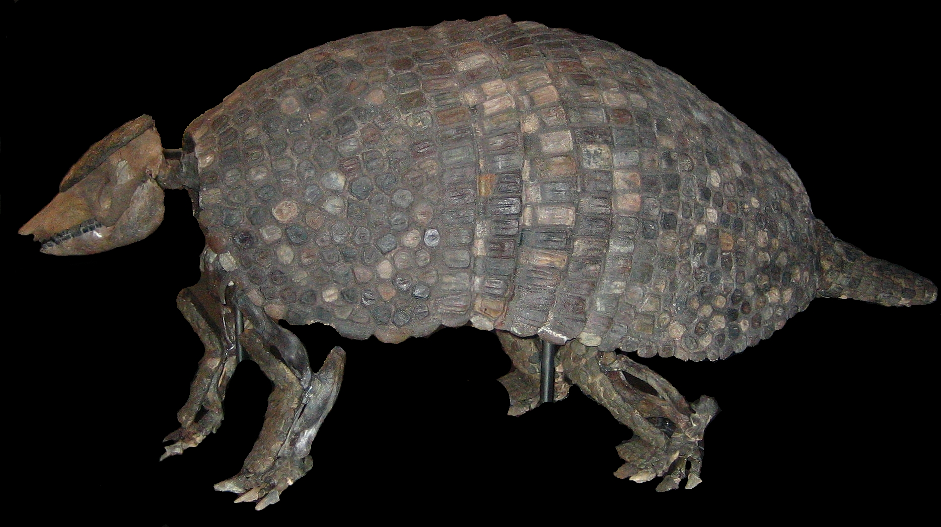 Holmesina septentrionalis at CosmoCaixa, Barcelona